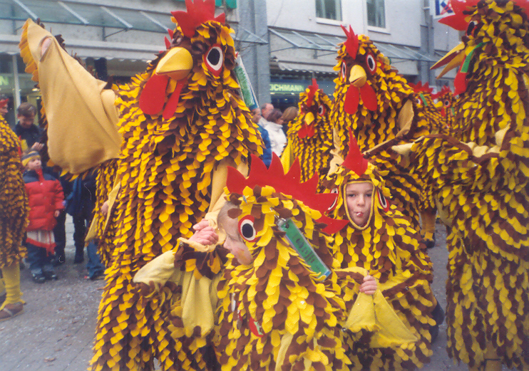 Narren der NZ Seegockel auf dem Umzug in Friedrichshafen 2001